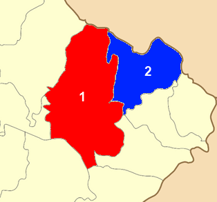 Χάρτης των δημοτικών ενοτήτων (πρώην δήμων) του Δήμου Νέας Ζίχνης.